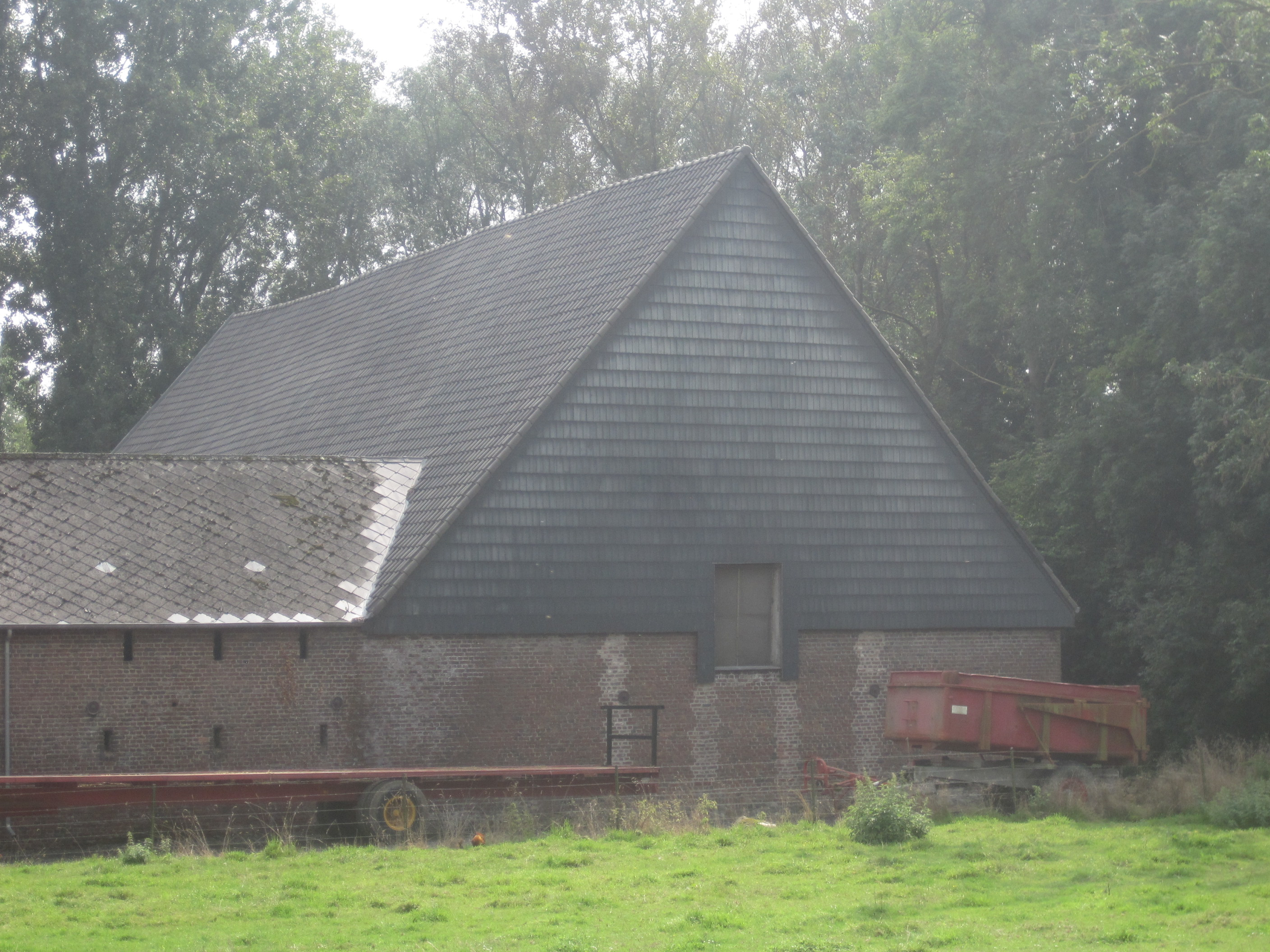 La totalité de la Grange sis rue du Gros chêne, n°1 à Liernu (M) ainsi que l'ensemble formé par celle-ci et les terrains environnants (S)